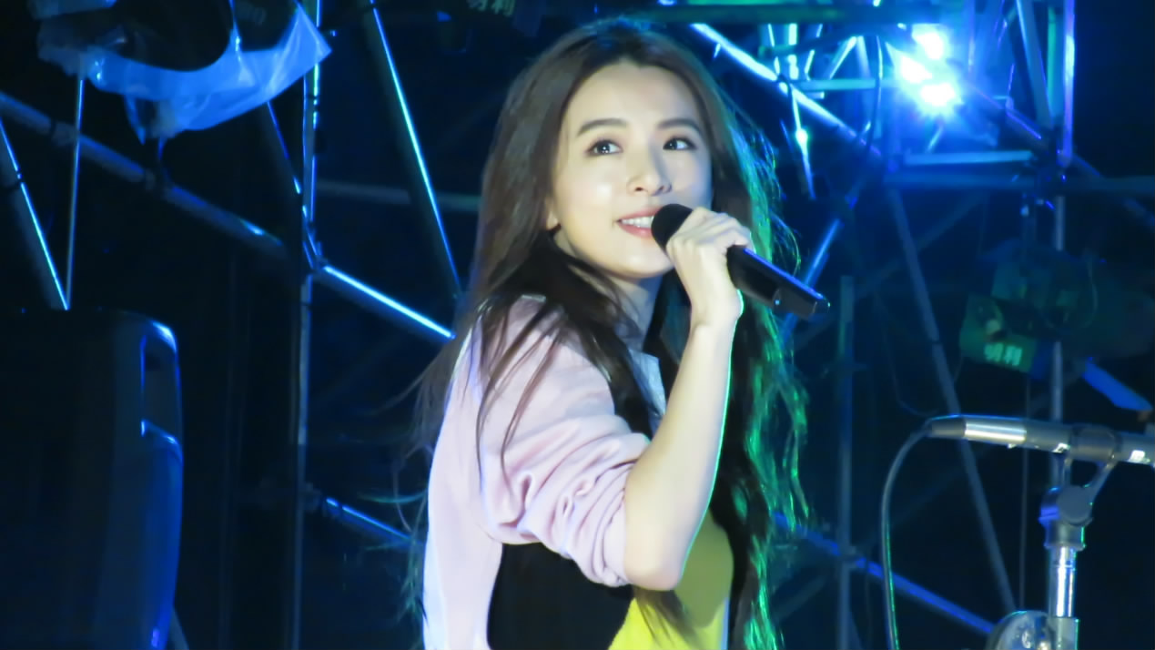 田馥甄於《2015年台灣國際客家文化嘉年華》活動演唱（攝於竹北市的新竹縣體育場館）